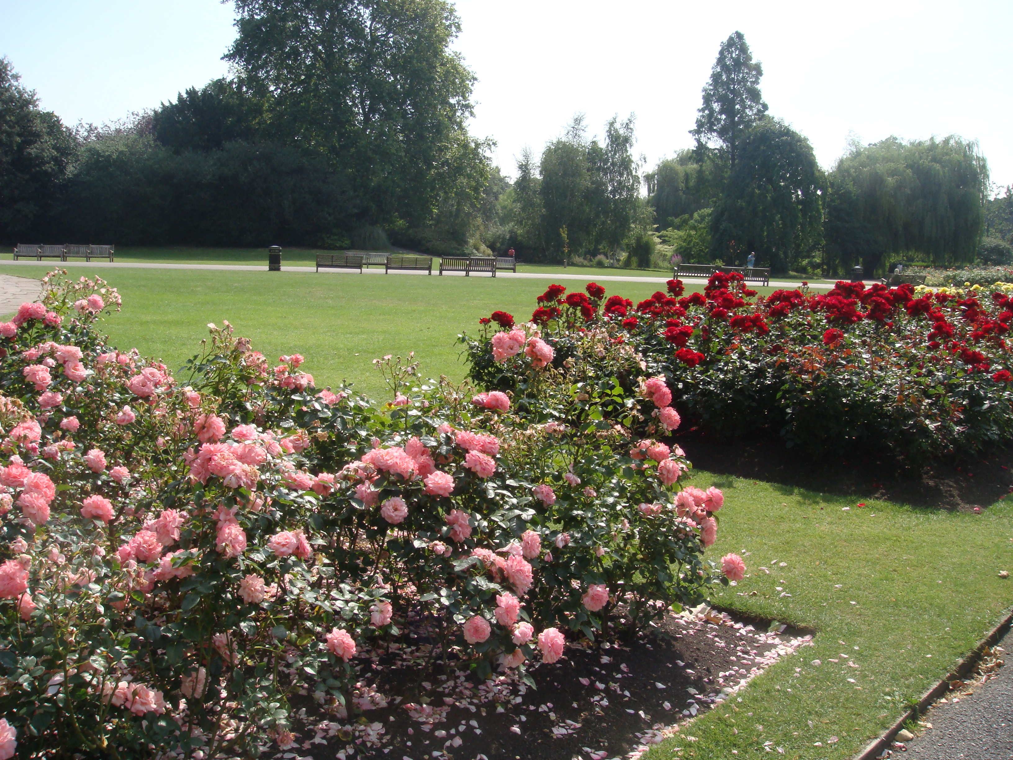 Queen Mary's Gardens, Regent's Park, London